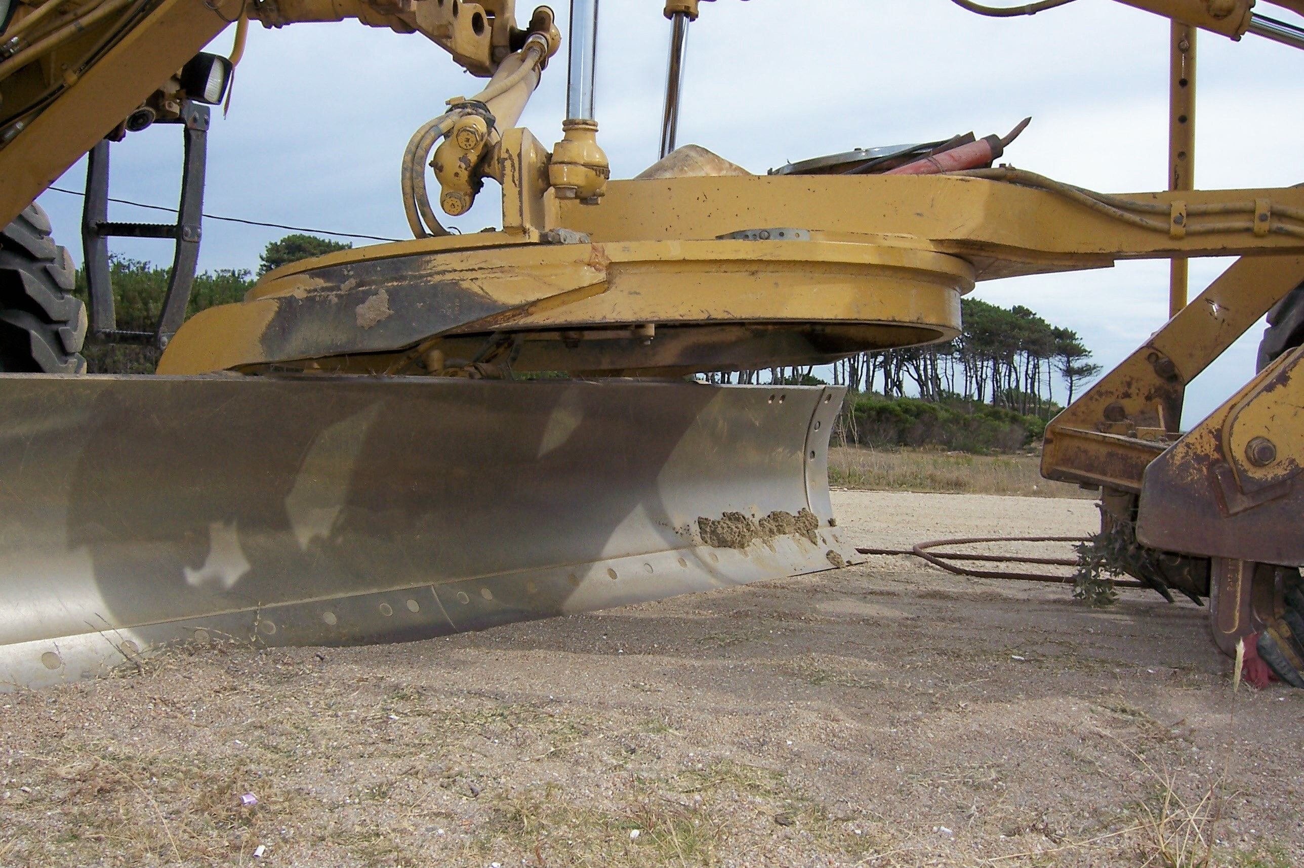 Motoniveladora